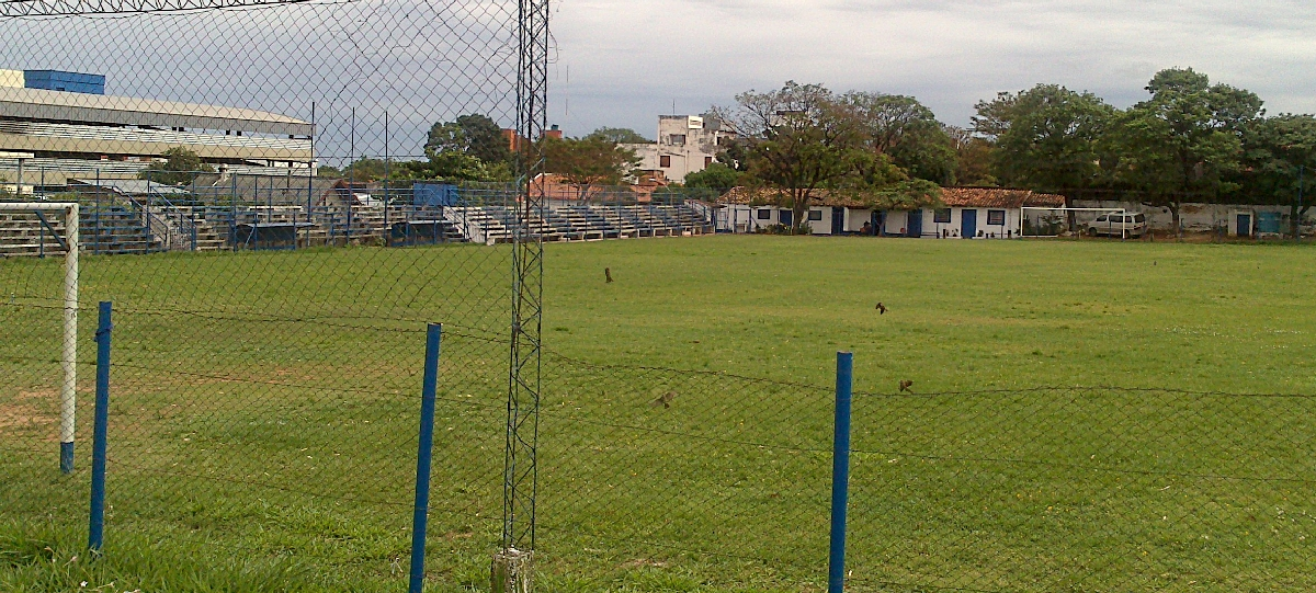 Vista del estadio José Tomás Silva del club Sportivo Ameliano. Asunción - Paraguay.